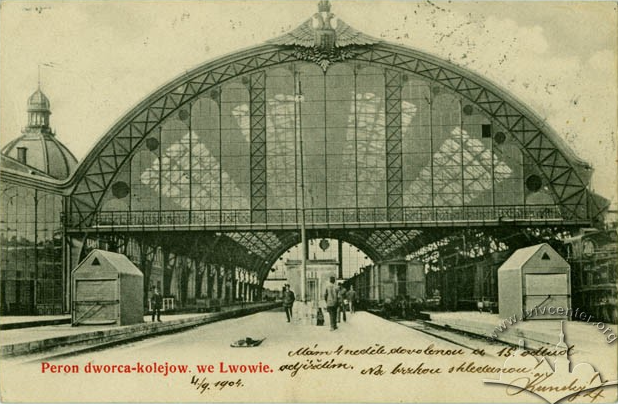 Дебаркадер львівського вокзалу.PNG: Дебаркадер львівського вокзалу